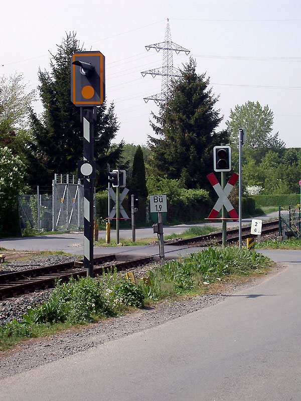 Unbeschrankter Bahnübergang der Königsteiner Bahn in Frankfurt-Unterliederbach mit Andreaskreuz und Lichtzeichenanlage für Straßenverkehr, sowie ÜS (Überwachungssignal) für Schienenverkehr.